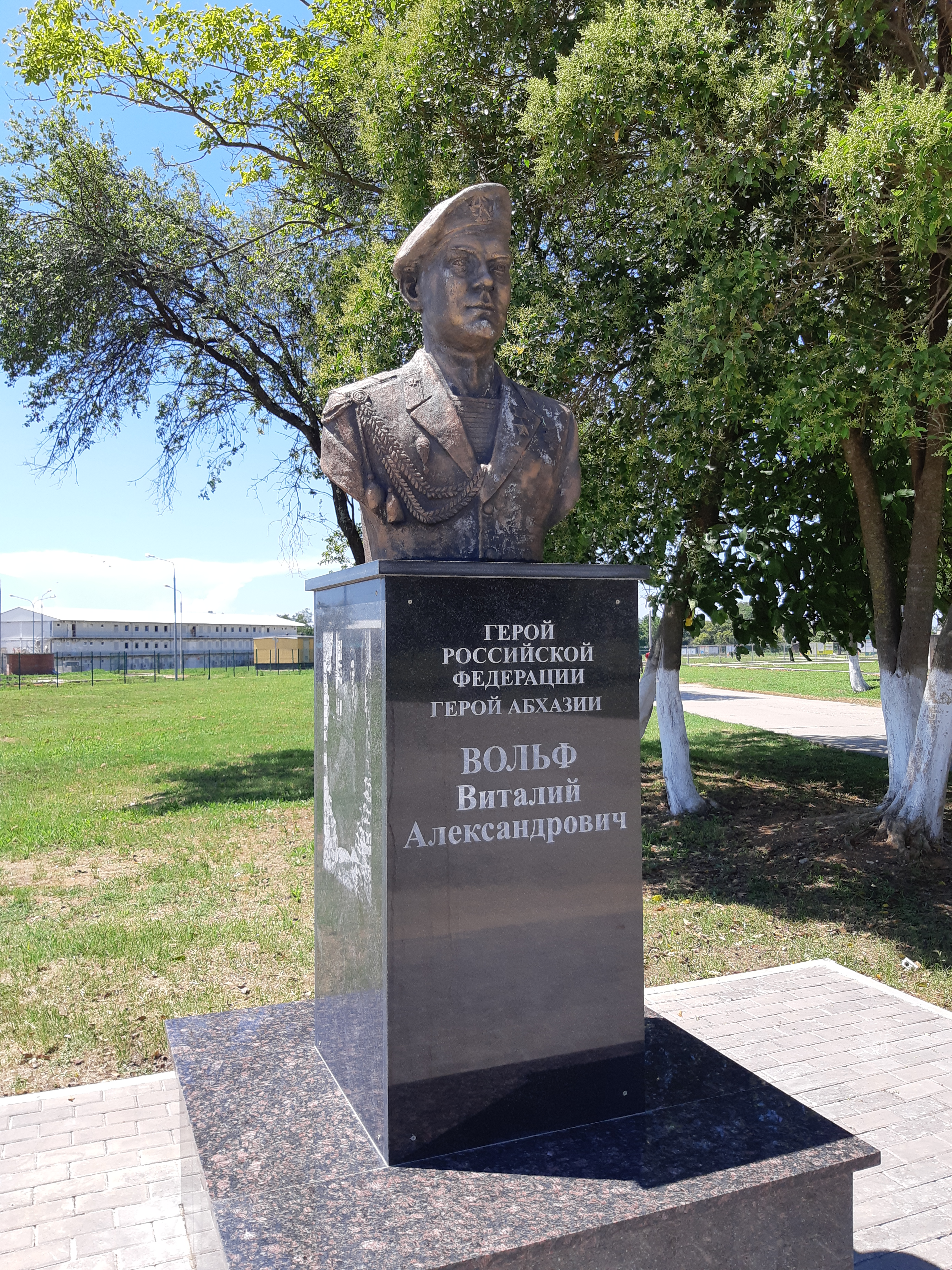 Вольф Виталий Александрович Герой России, Герой Абхазии